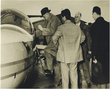 Aeroporto di Catania, ore 17.45 del 27 ottobre 1962: Graziano Verzotto accanto al pilota Irnerio Bertuzzi (di spalle) al momento della partenza di Enrico Mattei (sulla scaletta) per Linate. La foto smentisce l'alibi siracusano esibito da Verzotto in sede giudiziaria ed è l'ultima che ritrae il presidente dell'Eni vivo